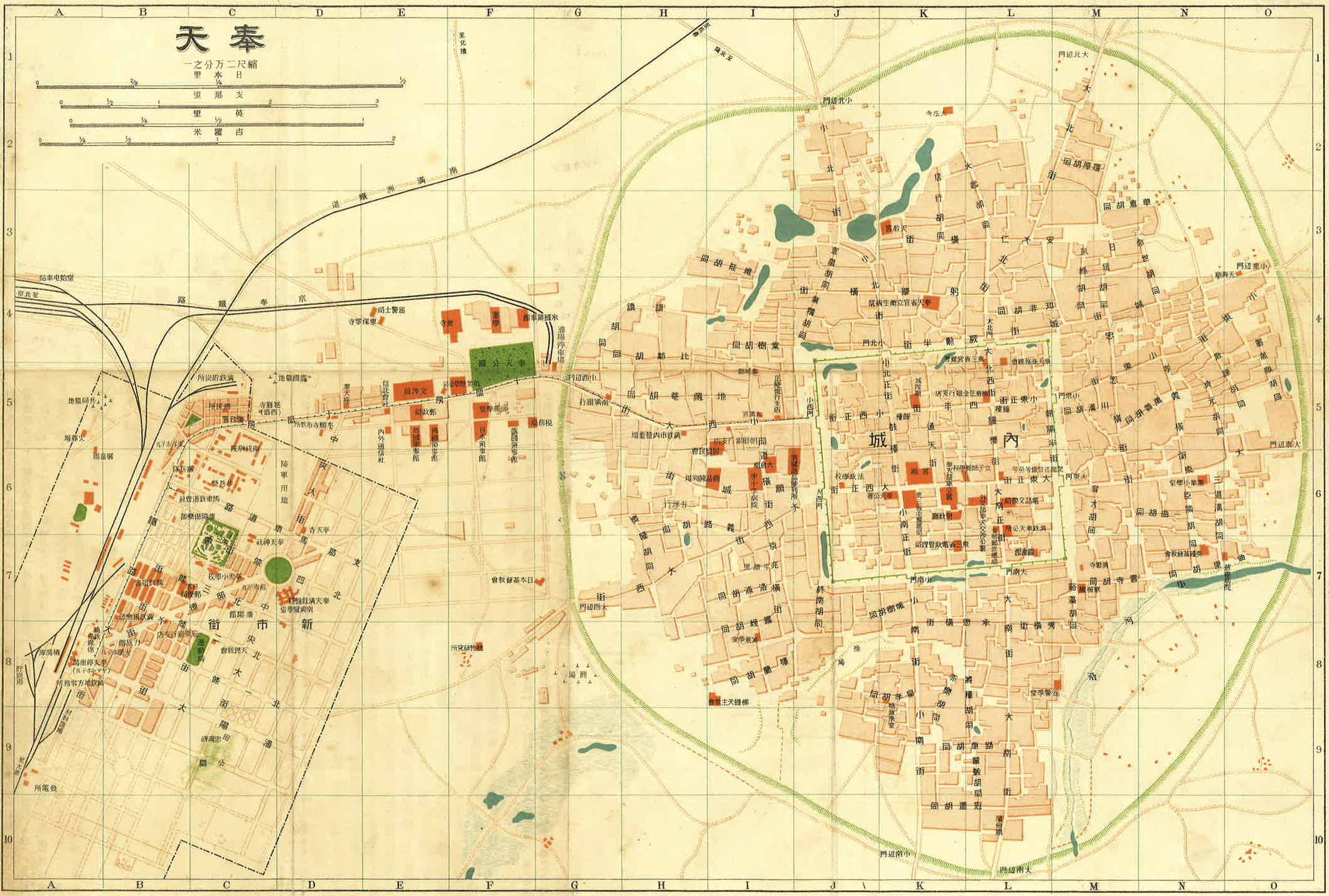 中文（中国大陆）: 1911年奉天（今辽宁省沈阳市）地图